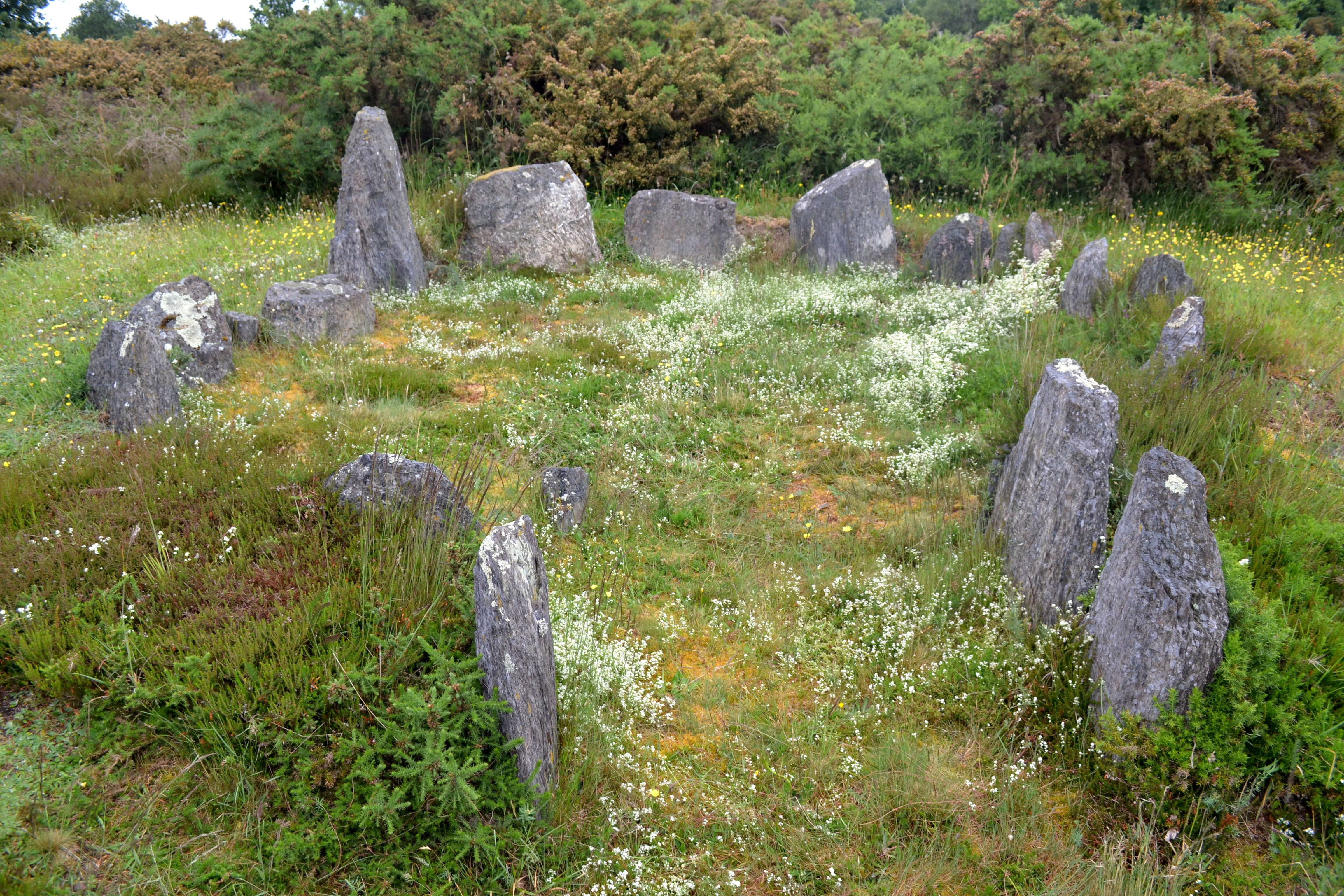 Dolmen nord de la Croix Saint-Pierre